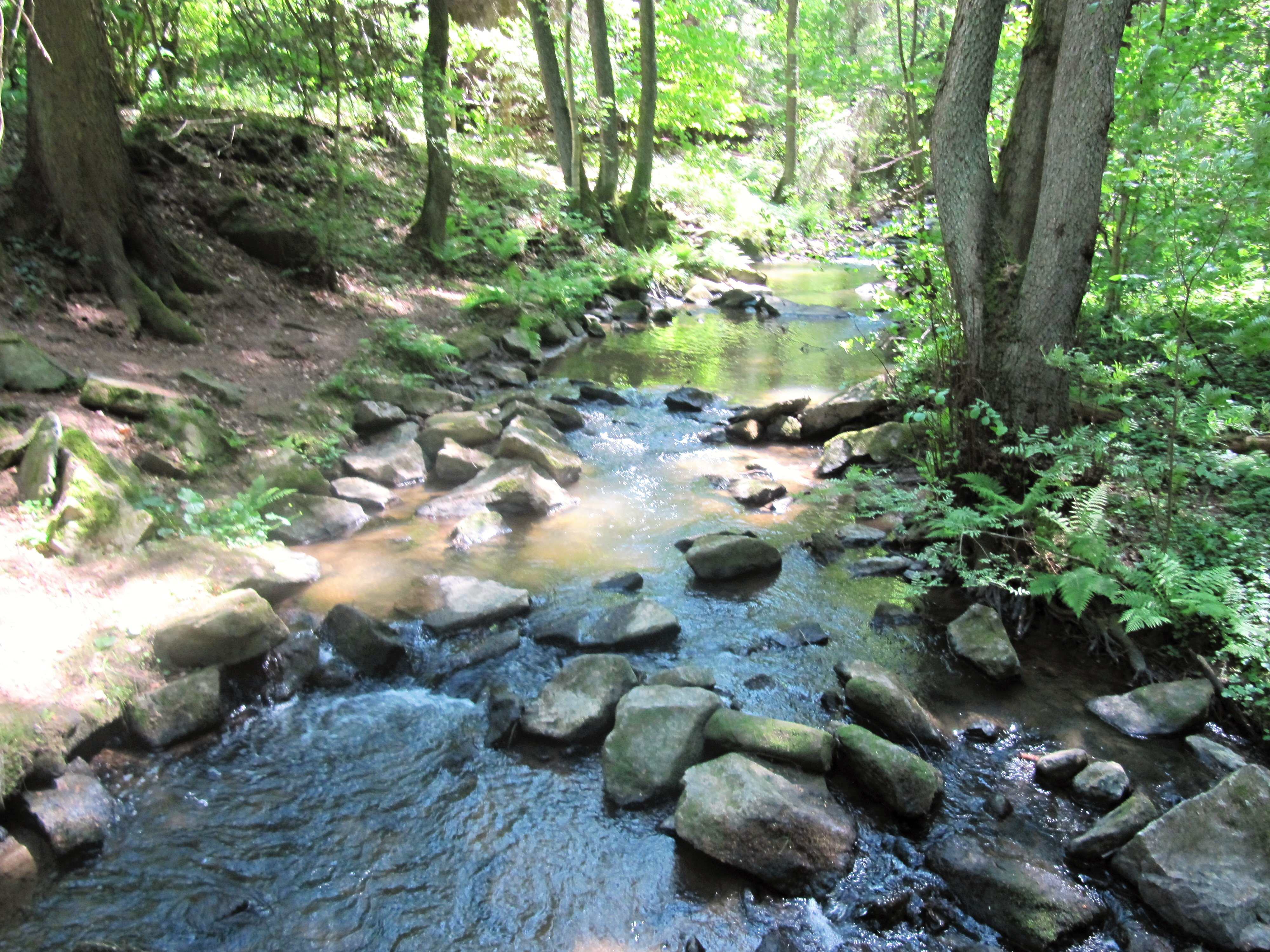 Brodec (přítok Vlašimské Blanice)